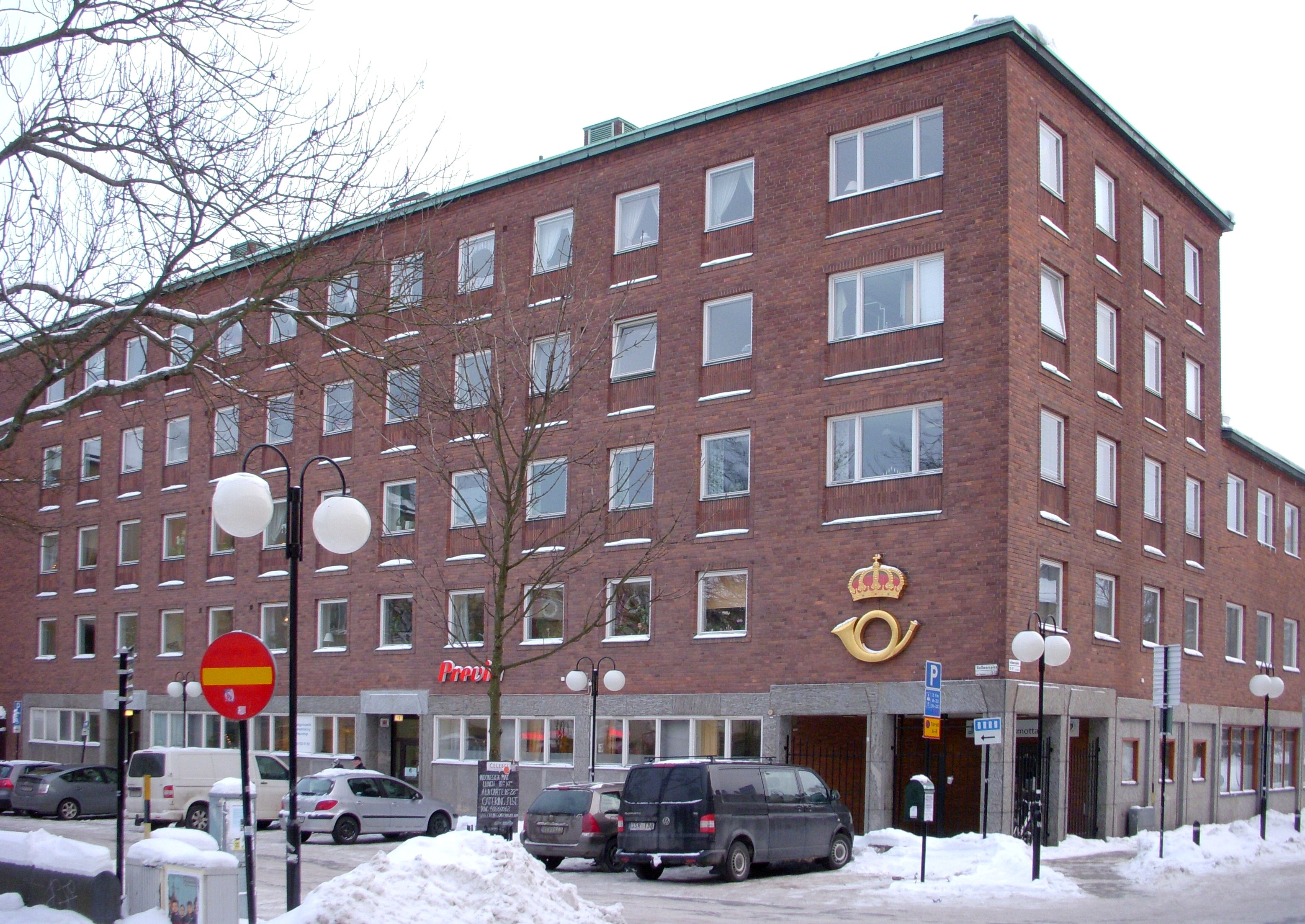 Posthuset på Gullmarsplan i Stockholm (arkitekt Lars-Erik Lallerstedt)